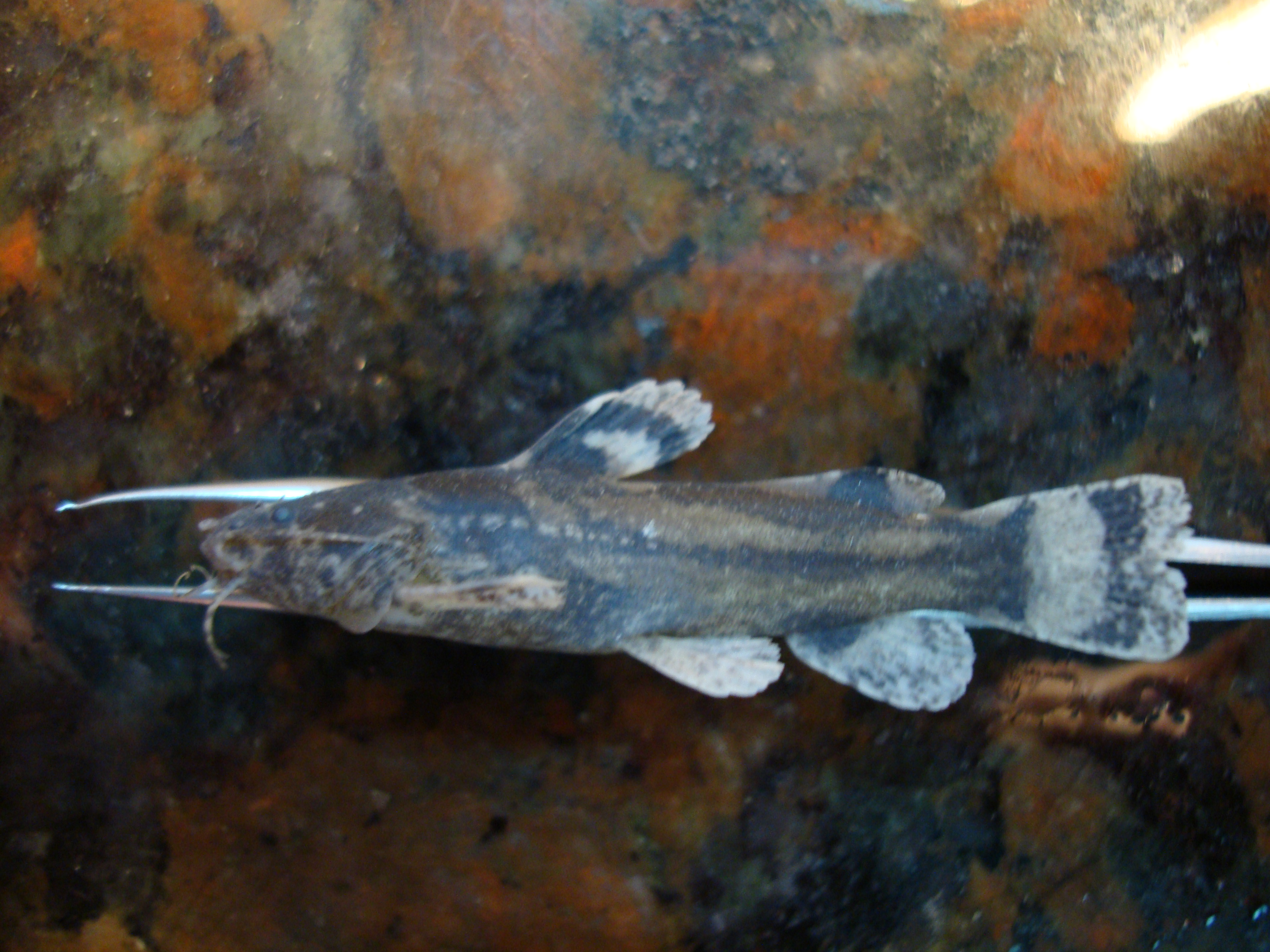 M. nigrolineatus